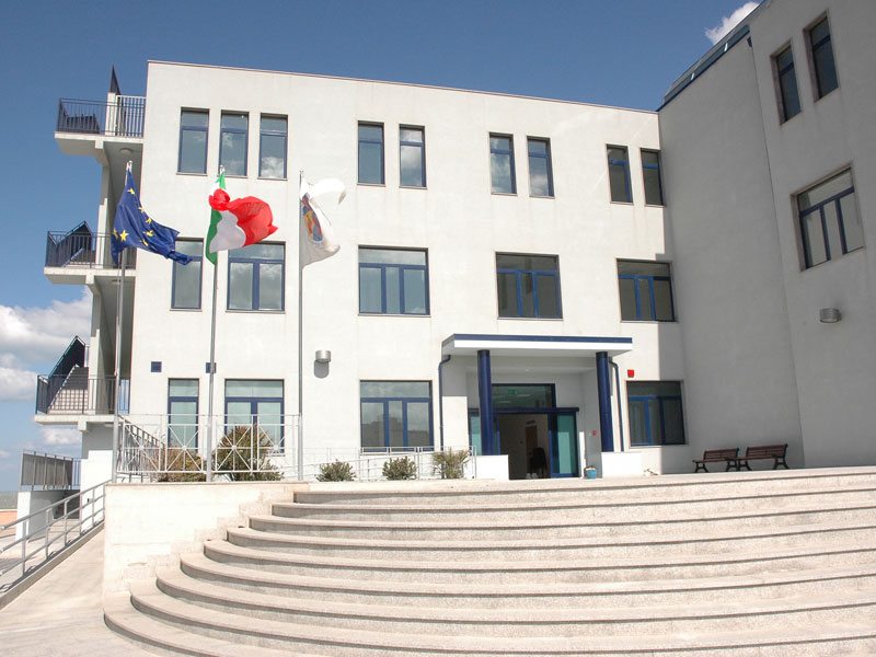 Unimol - Facoltà d'Ingegneria